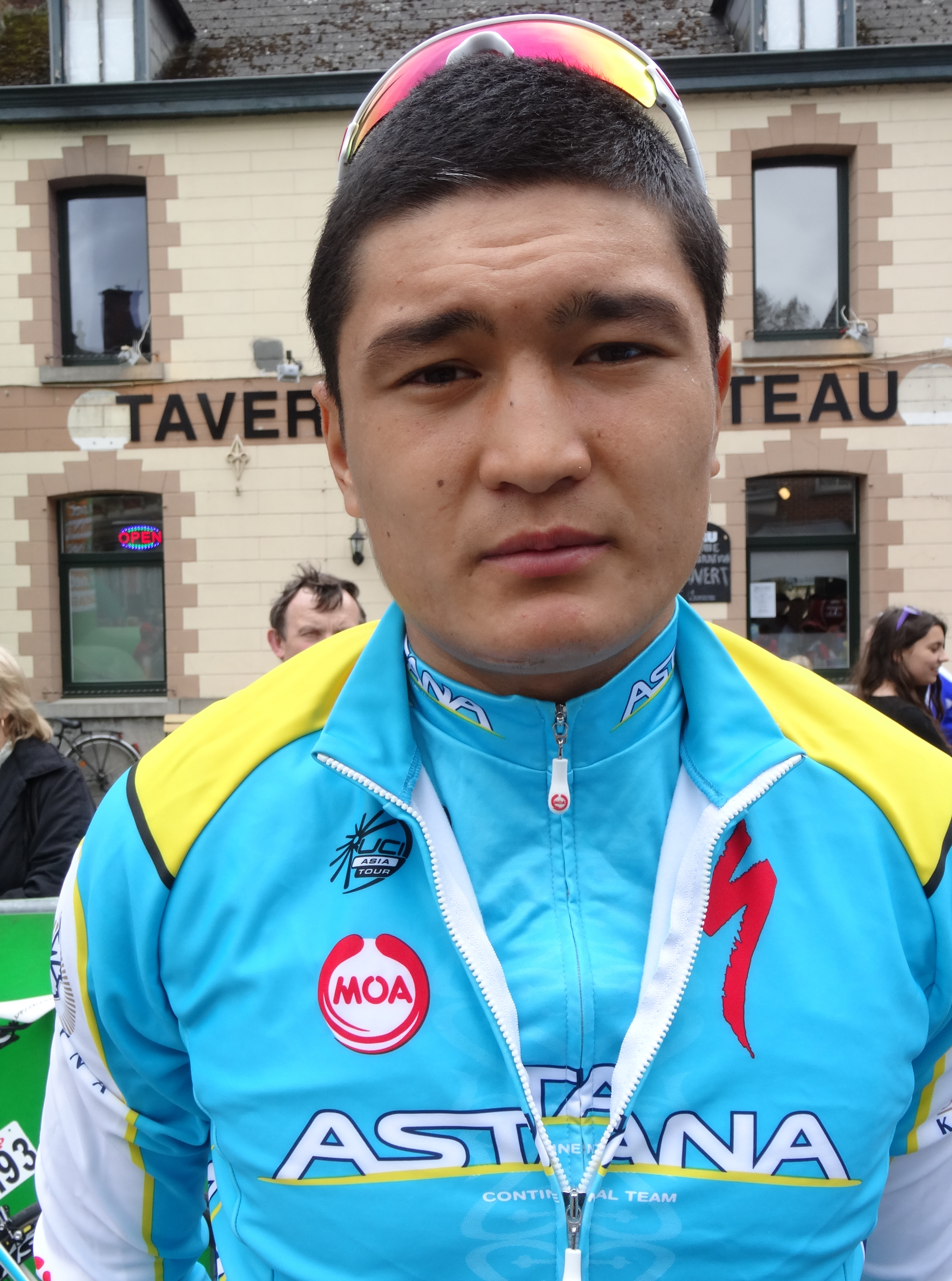 Triptyque des Monts et Châteaux 2014, étape 3, 6 avril 2014, départ de Belœil. Depicted person: Nurbolat Kulimbetov Depicted team: Astana Continental The creation of these files was made possible thanks to the organizers of the Triptyque des Monts et Châteaux 2014 English | français | +/−